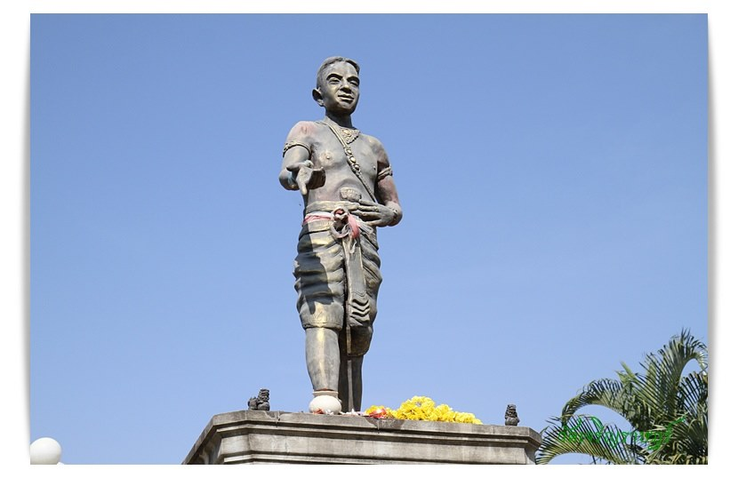 เจ้าแก้วมงคล ผู้สถาปนาเมืองท่งสีพูม